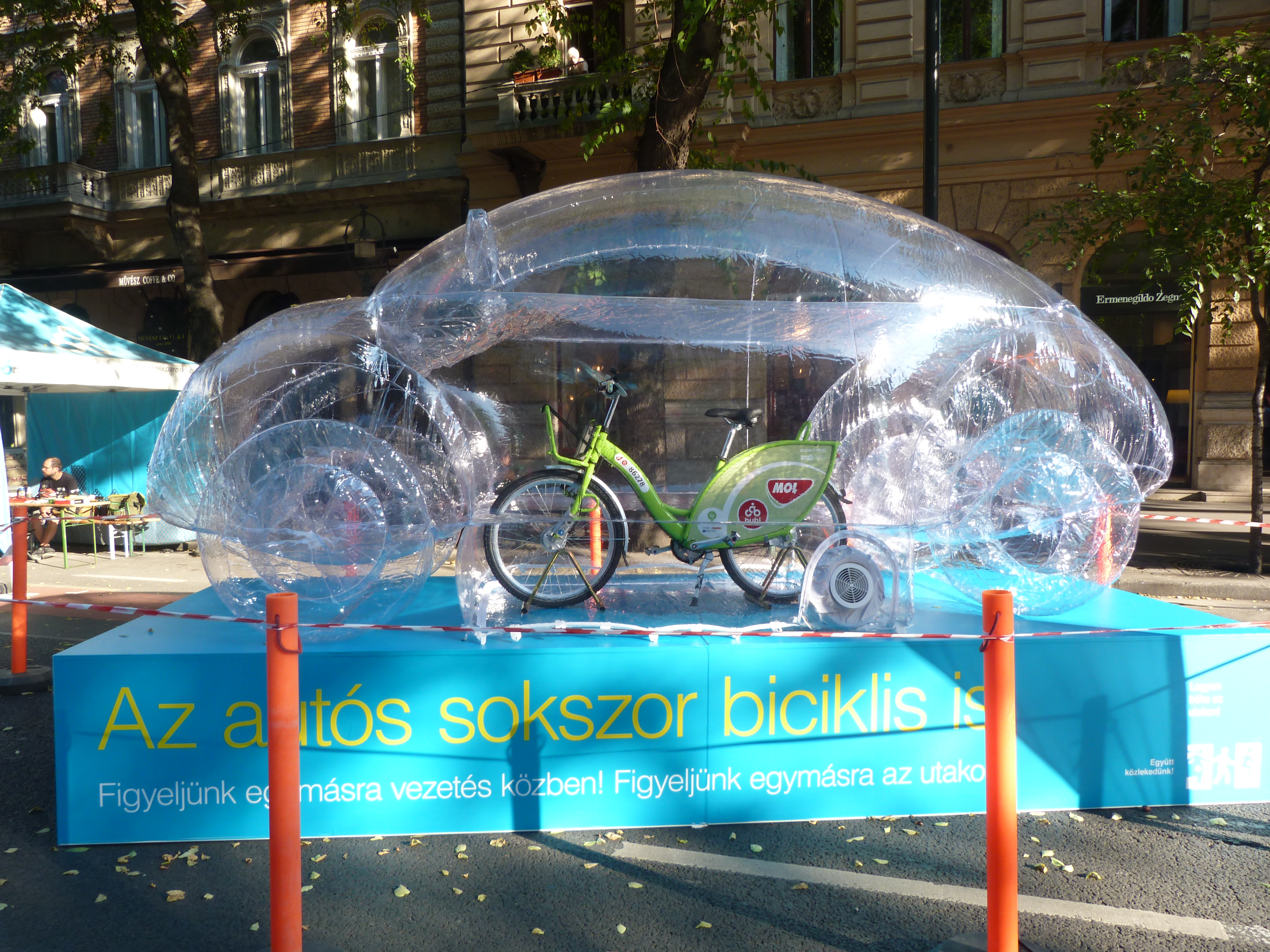 A felvétel 2014. szeptember 21-én készült Budapesten, az Andrássy úton. ©© Derzsi Elekes Andor, Budapest, 2014, A kép és filmfelvételek egészben, vagy részletekben másolását, bármilyen úton történő sokszorosítását és felhasználását a szerző ellenérték nélkül, jogutódjaira is kihatóan megengedi. Az engedély kiterjed a kereskedelmi célú hasznosításra is. Kéri azonban nevének feltüntetését a felhasználás során. A Metapolisz sorozat valamennyi képe és filmje Creative Commons alatti valamint kereskedelmi - for profit - célra is felhasználható. Ajánlott hivatkozás: Derzsi Elekes Andor: Metapolisz DVD line